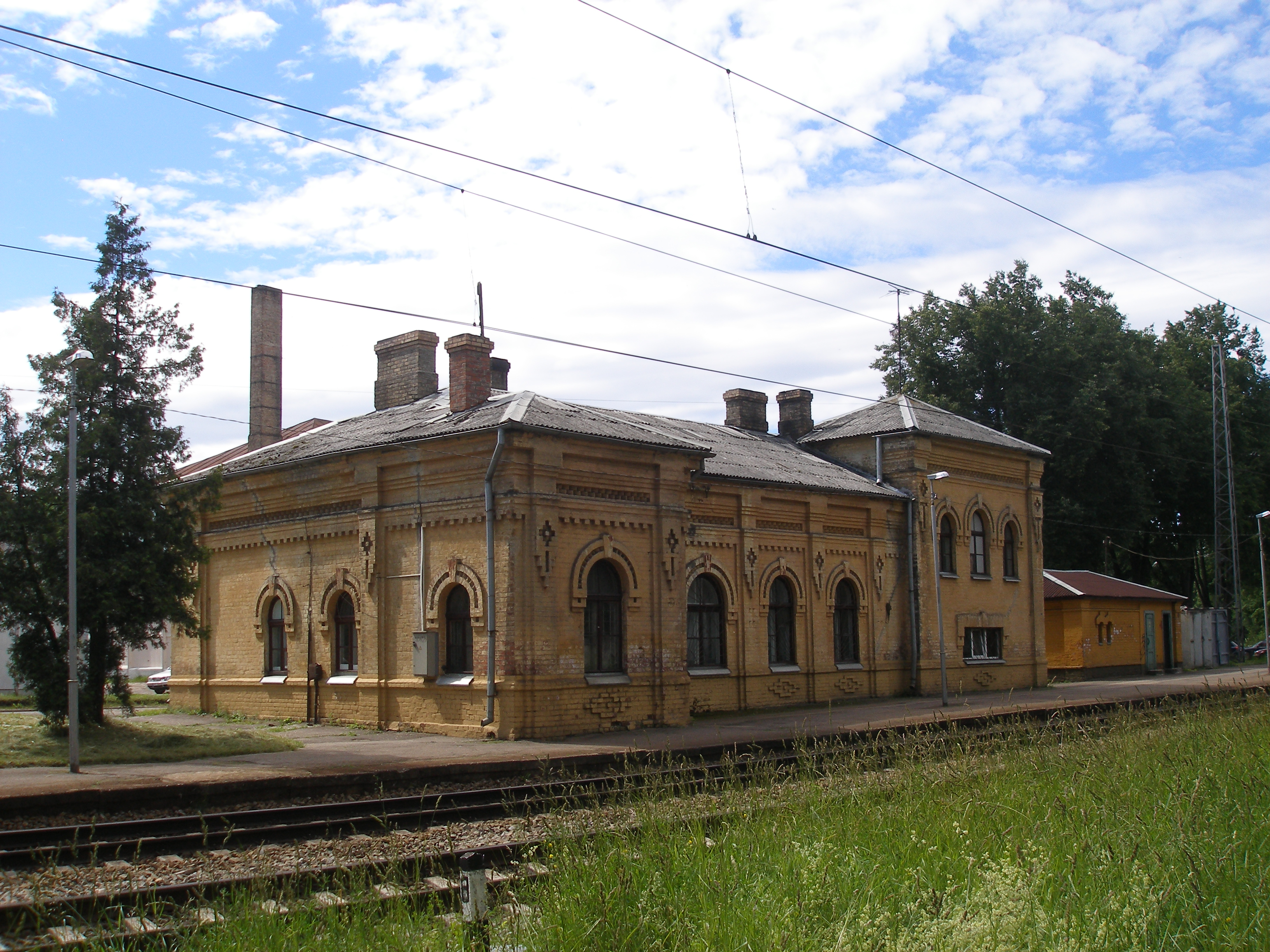 Brasas stacijas vecā ēka